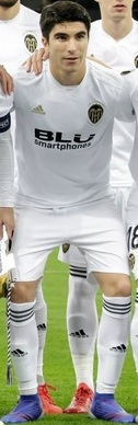 Alineació del València CF en el partit d'Europa League contra el Krasnodar, 2019.